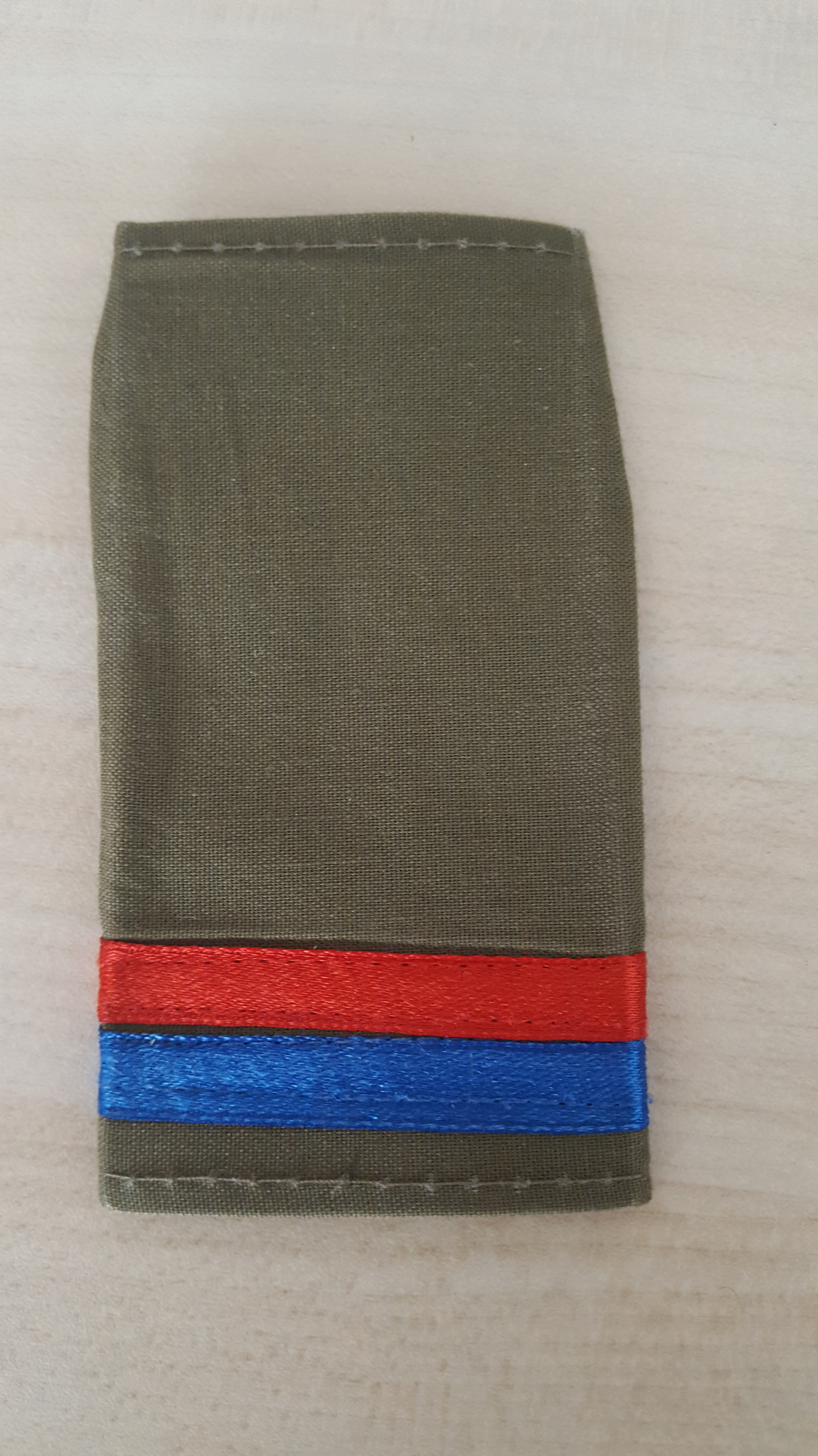 כותפת תכנית פסגות, הנענדת על ידי החניכים במהלך סדרות הקיץ של התכנית.